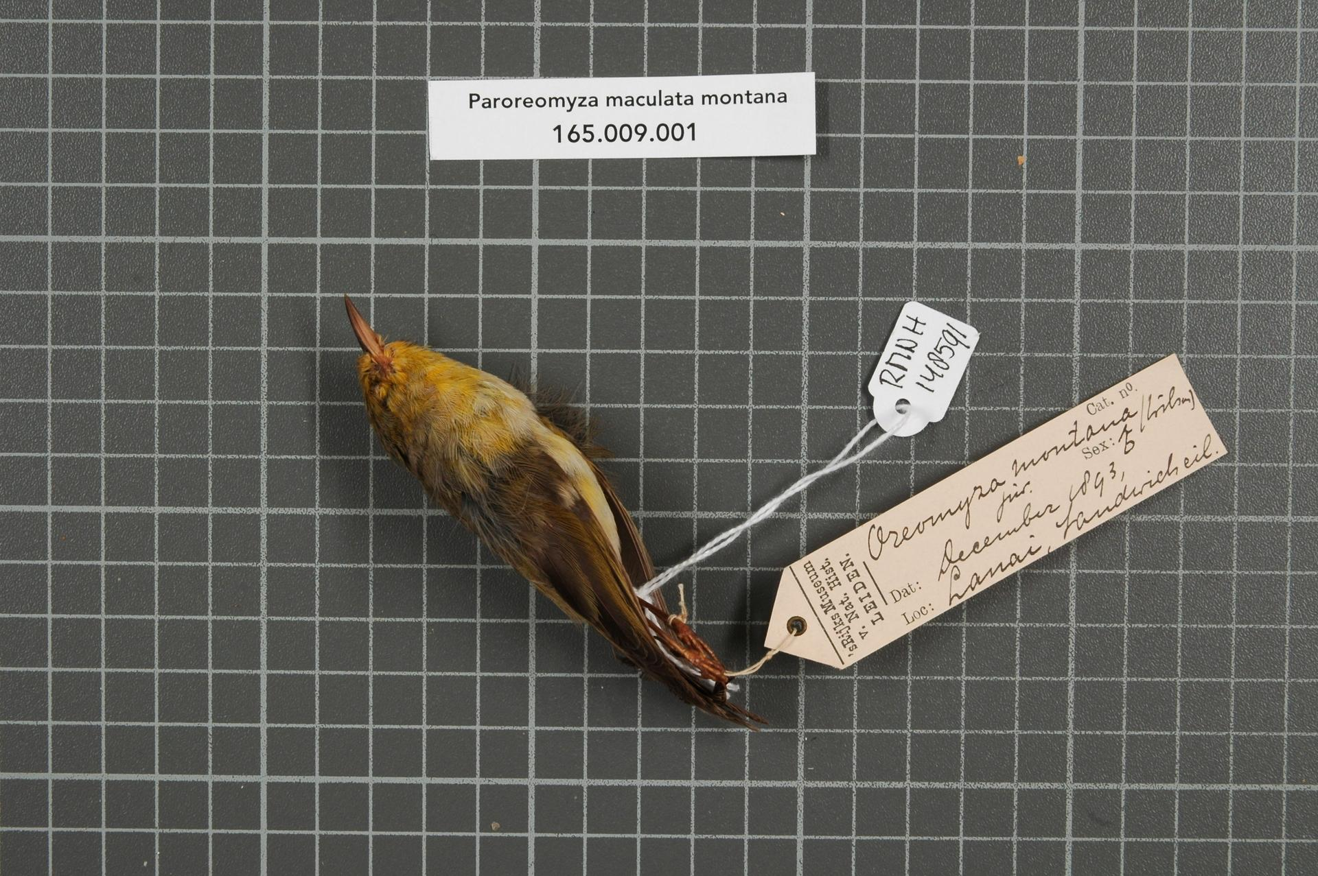 Paroreomyza maculata montana (Wilson, 1890)